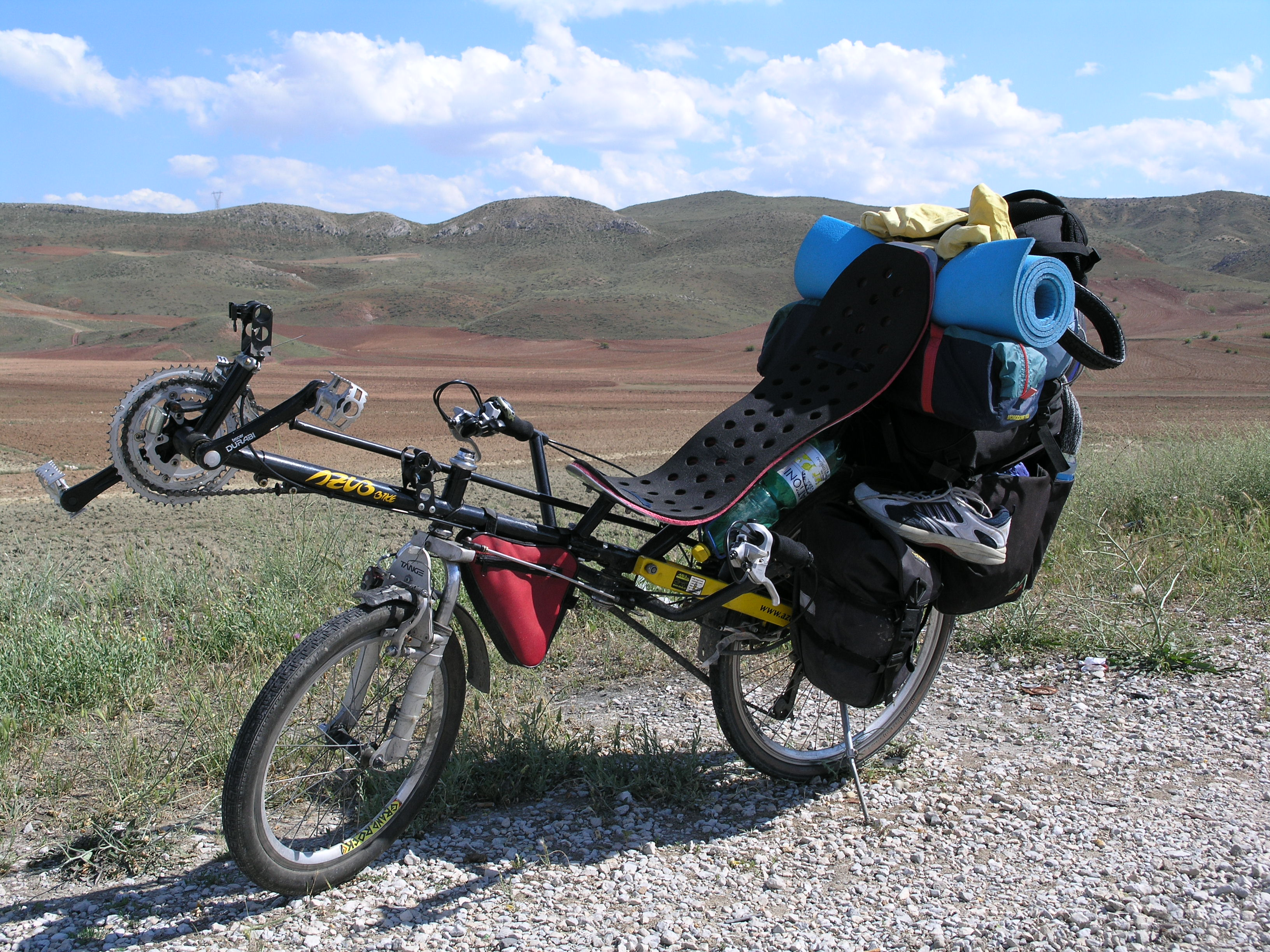 1. lehokolo českého výrobce AZUB